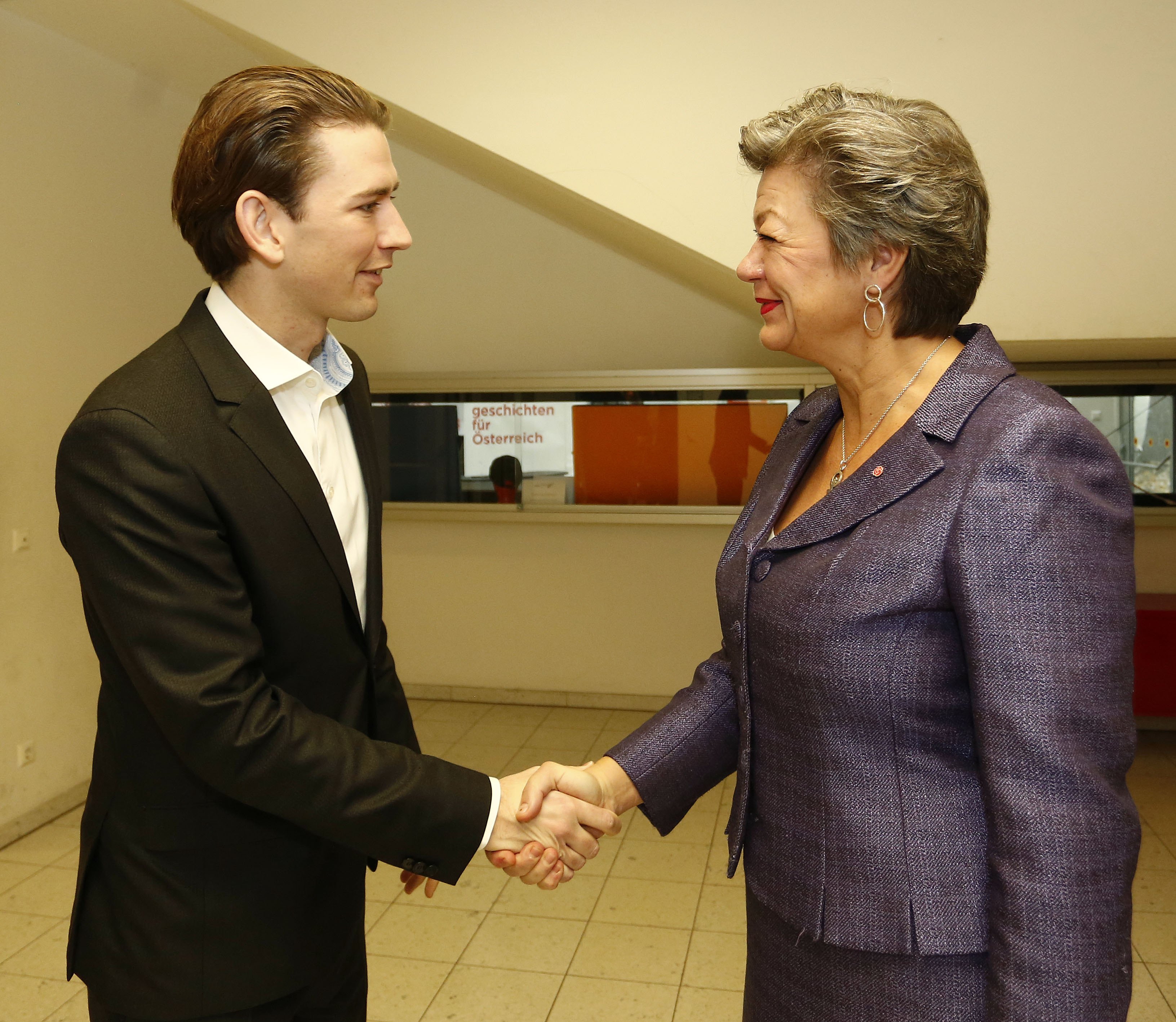 Wiener Zukunftsgespräche. BM Sebastian Kurz trifft die schwedische Arbeitsministerin Ylva Johansson. Zusammen Österreich Schulbesuch mit ausländischen Delegationen der Konferenz Vienna Future Talks. Wien. 09.11.2015, Foto: Dragan Tatic